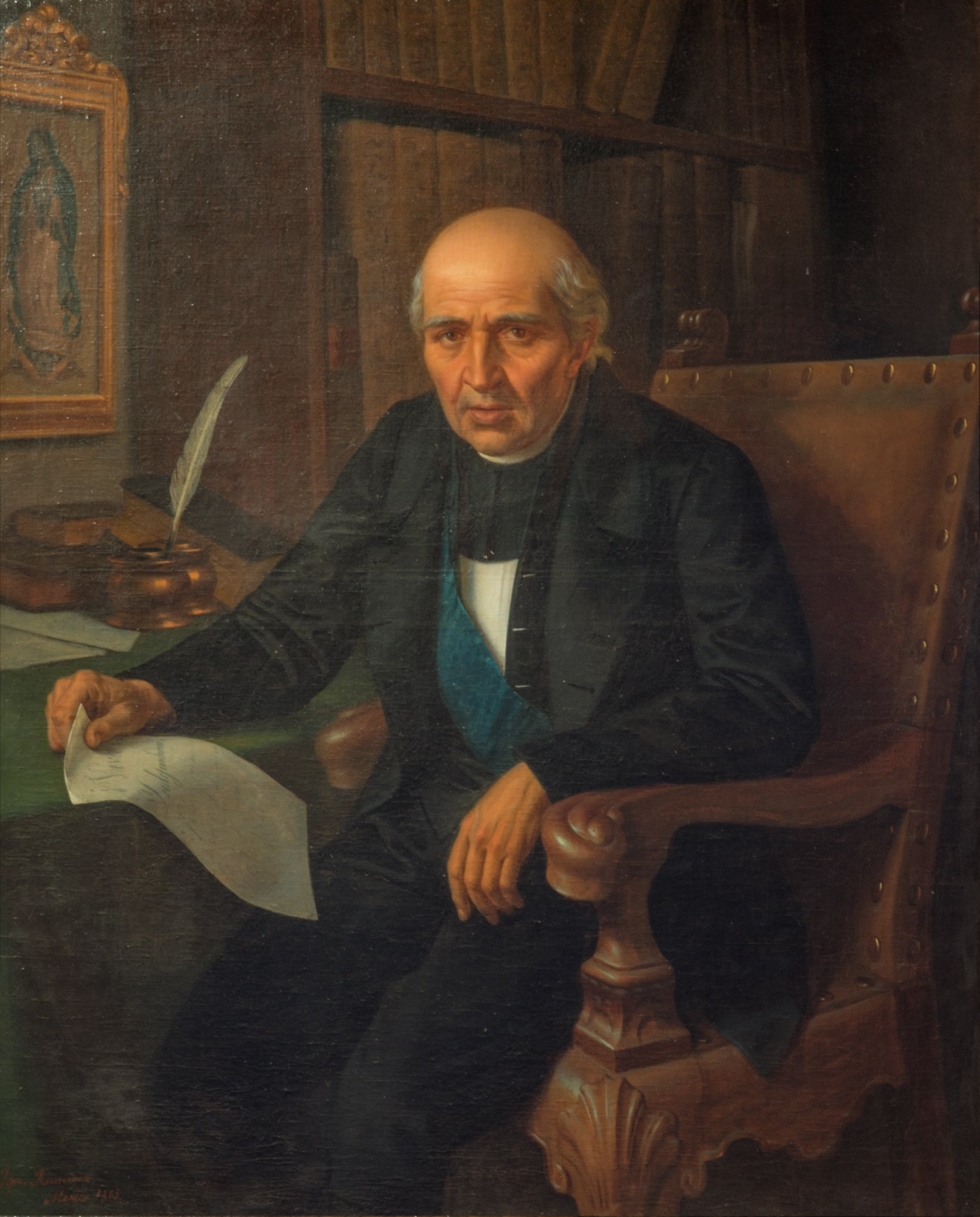 Portrait of Miguel Hidalgo y Costilla (1753-1811)